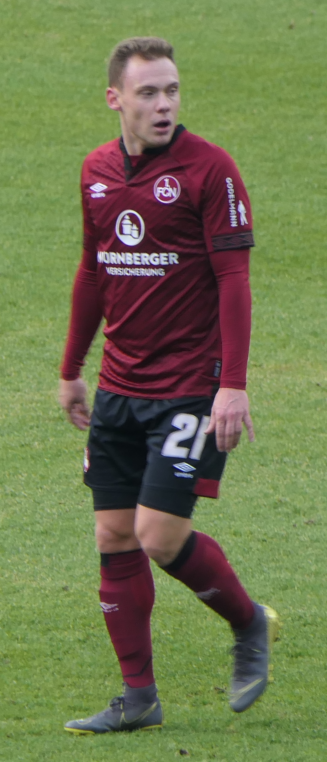 Der Fussballprofi Federico Palacios vom 1.FC Nürnberg beim Heimspiel gegen Werder Bremen am 02.02.2019.